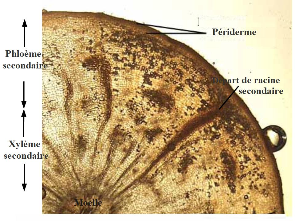 Coup transversale de carotte.